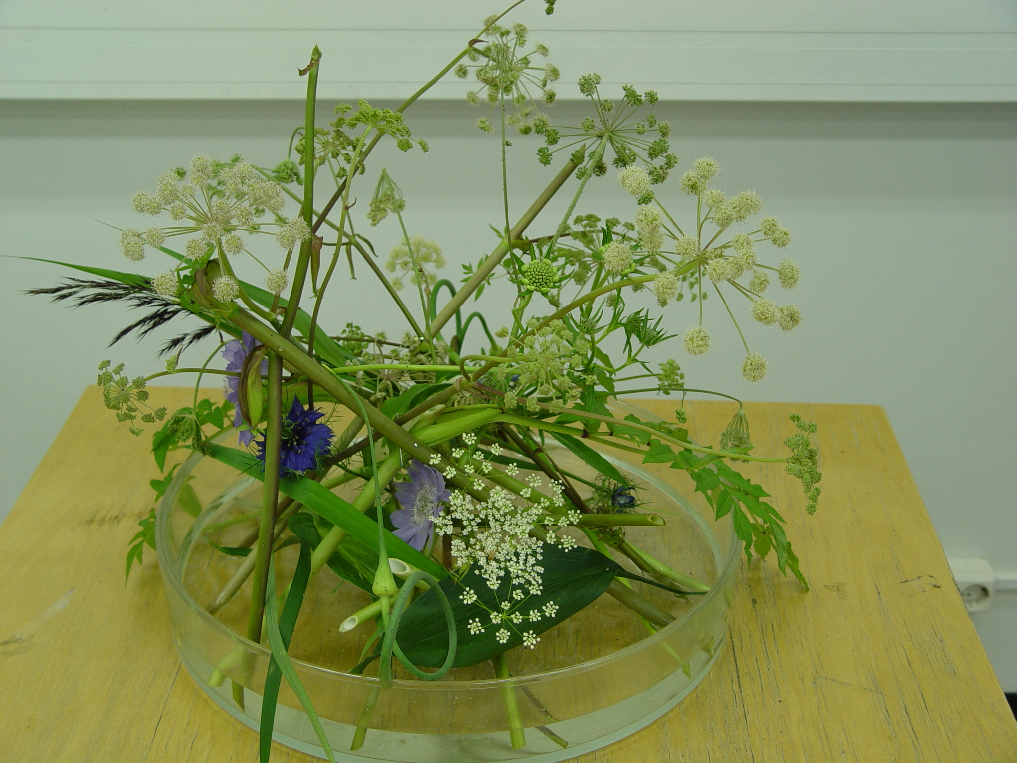 Asetelma - transparentti tyylisuunta